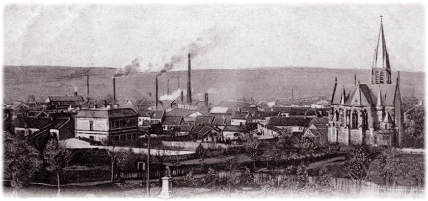 Panorama Forbach um 1910 mit Prot.-Luth. Kirche